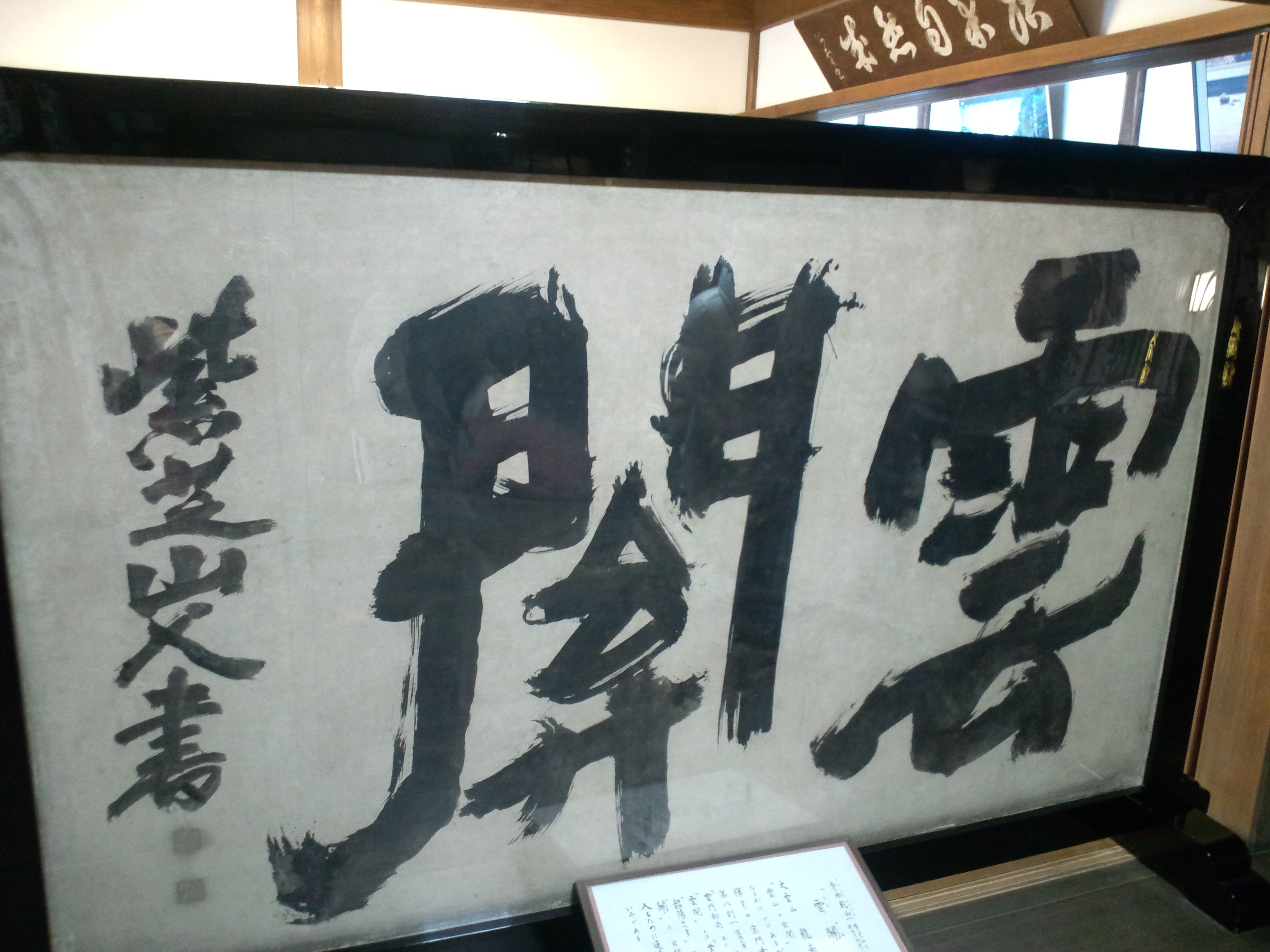 龍安寺 衝立（寺西乾山筆）